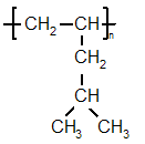 Polymethylpentene